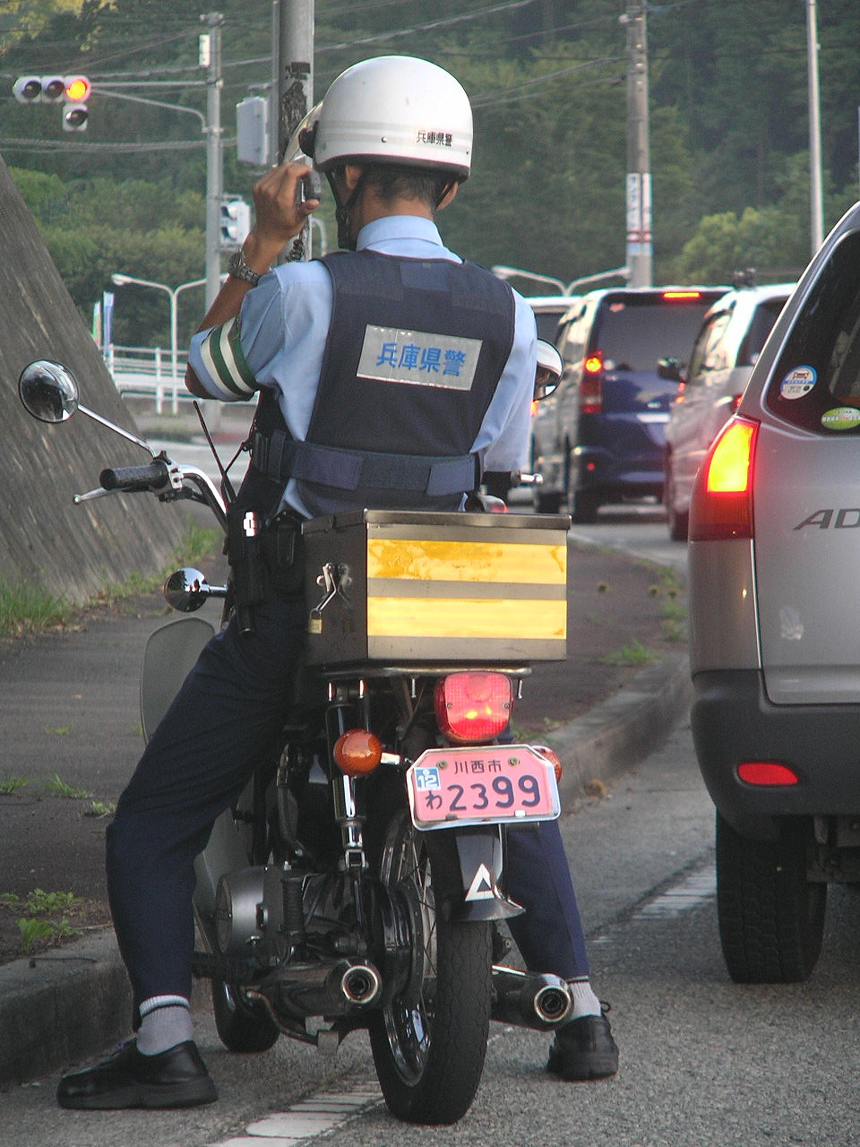 バイクに乗る警察官